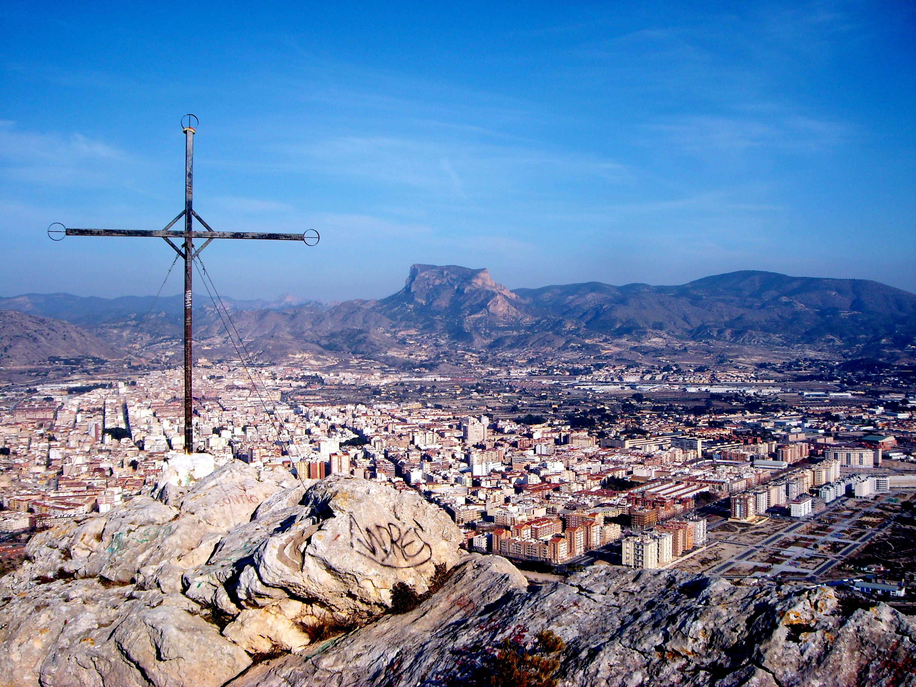 Cruz del Monte Bolón, Elda al fondo.